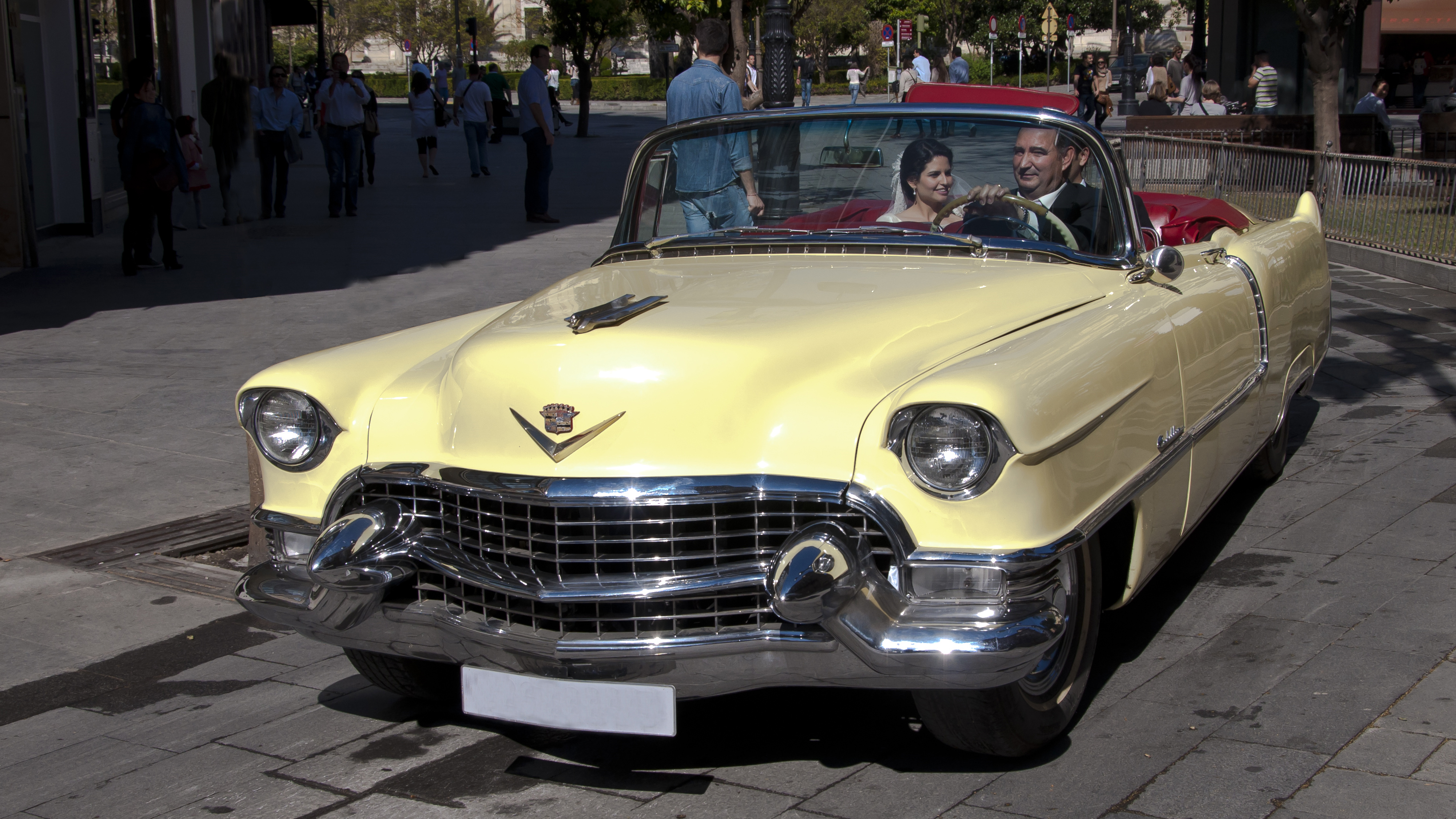 Een Cadillac Coupe Deville 1955 in Sevilla